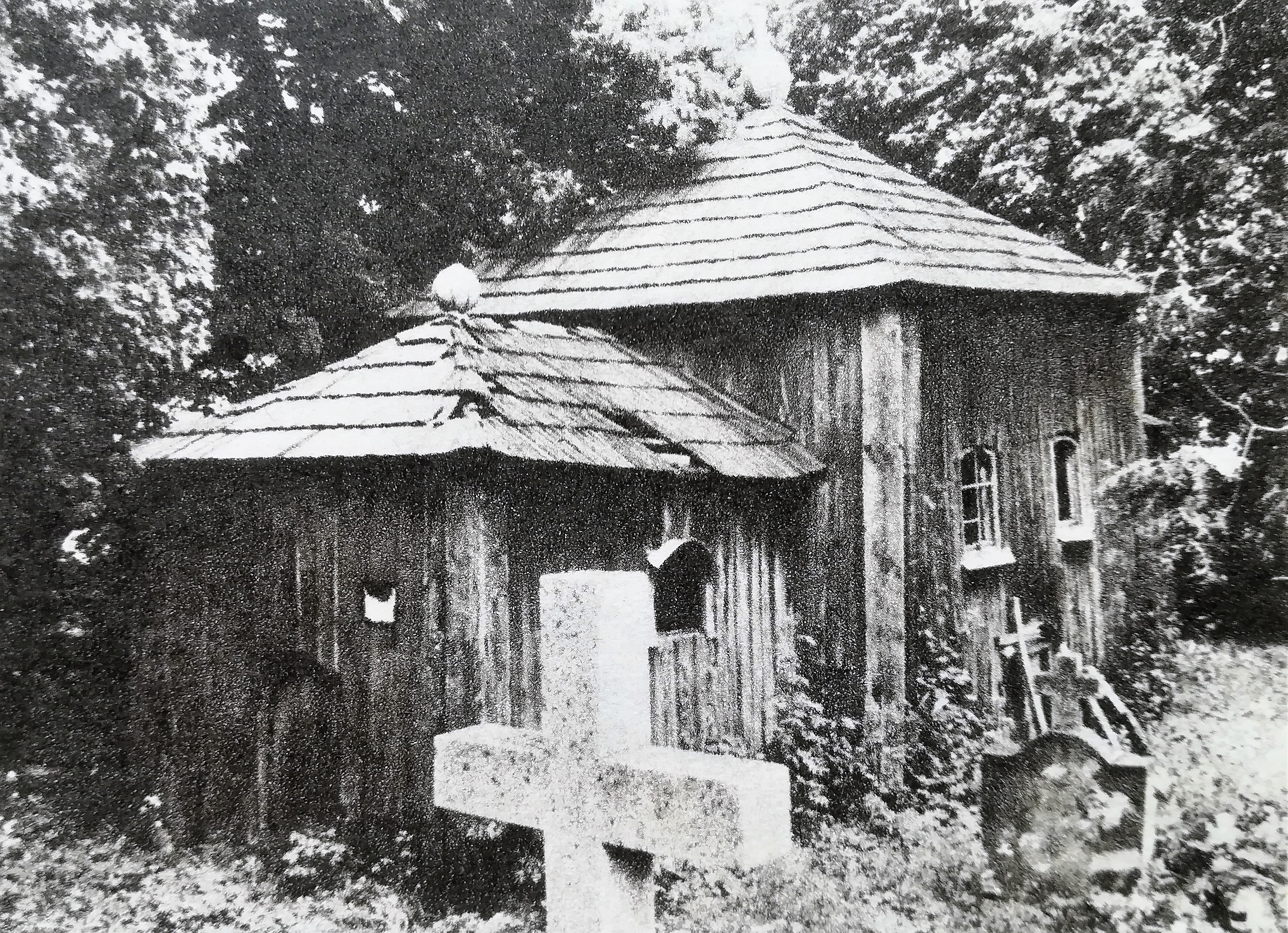 Cerkiew - Kruhel Wielki, 1988r.